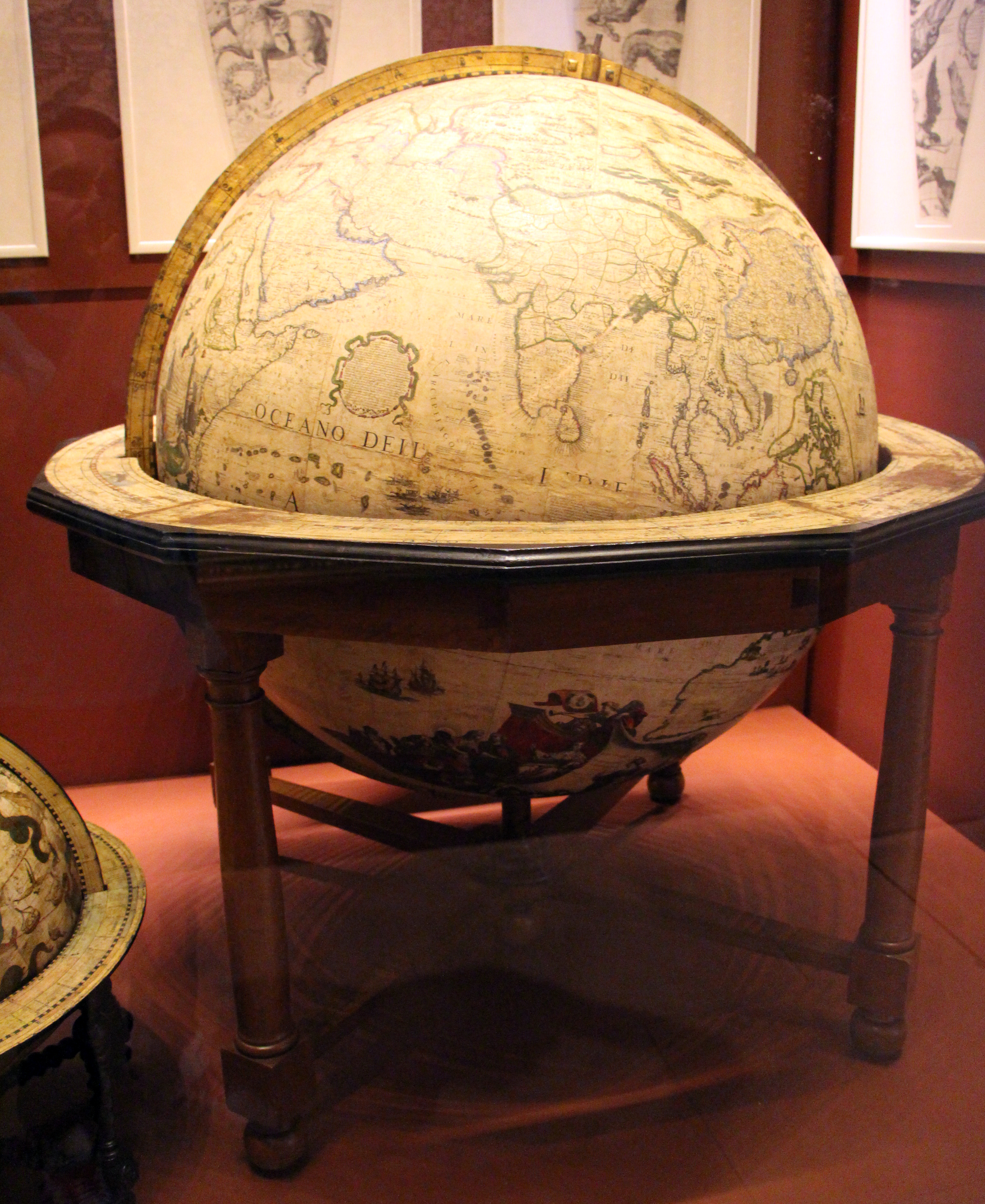 Museo Galileo, Firenze